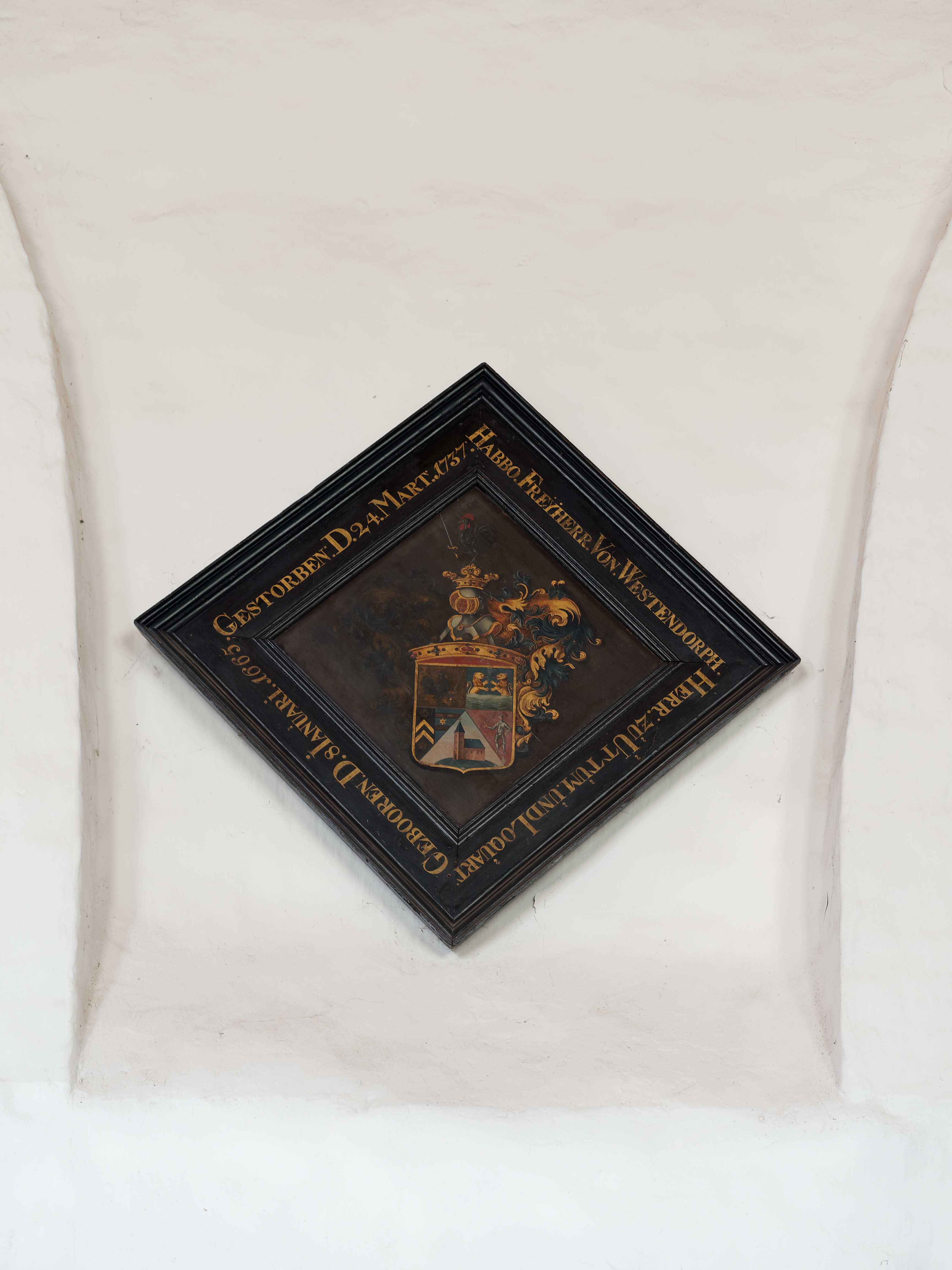 Epitaph für Habbo Freyherr von Westendorph in der ev. reformierten Kirche in Uttum (Ostfriesland).